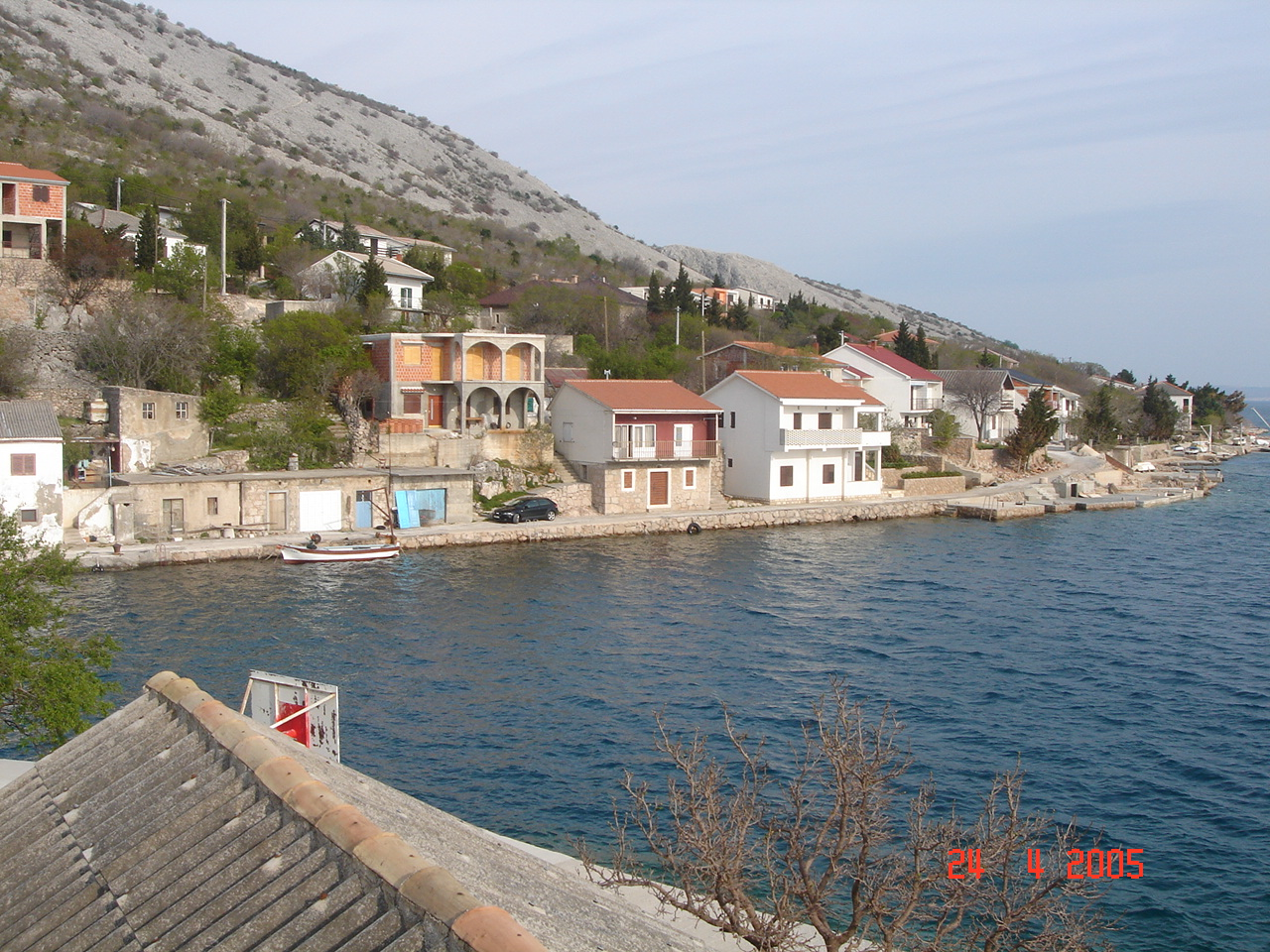 Barić Draga gledan sa zapada